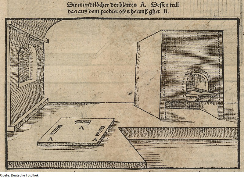 Original image description from the Deutsche Fotothek Bergwerk & Bergbau & Metallurgie & Probierofen